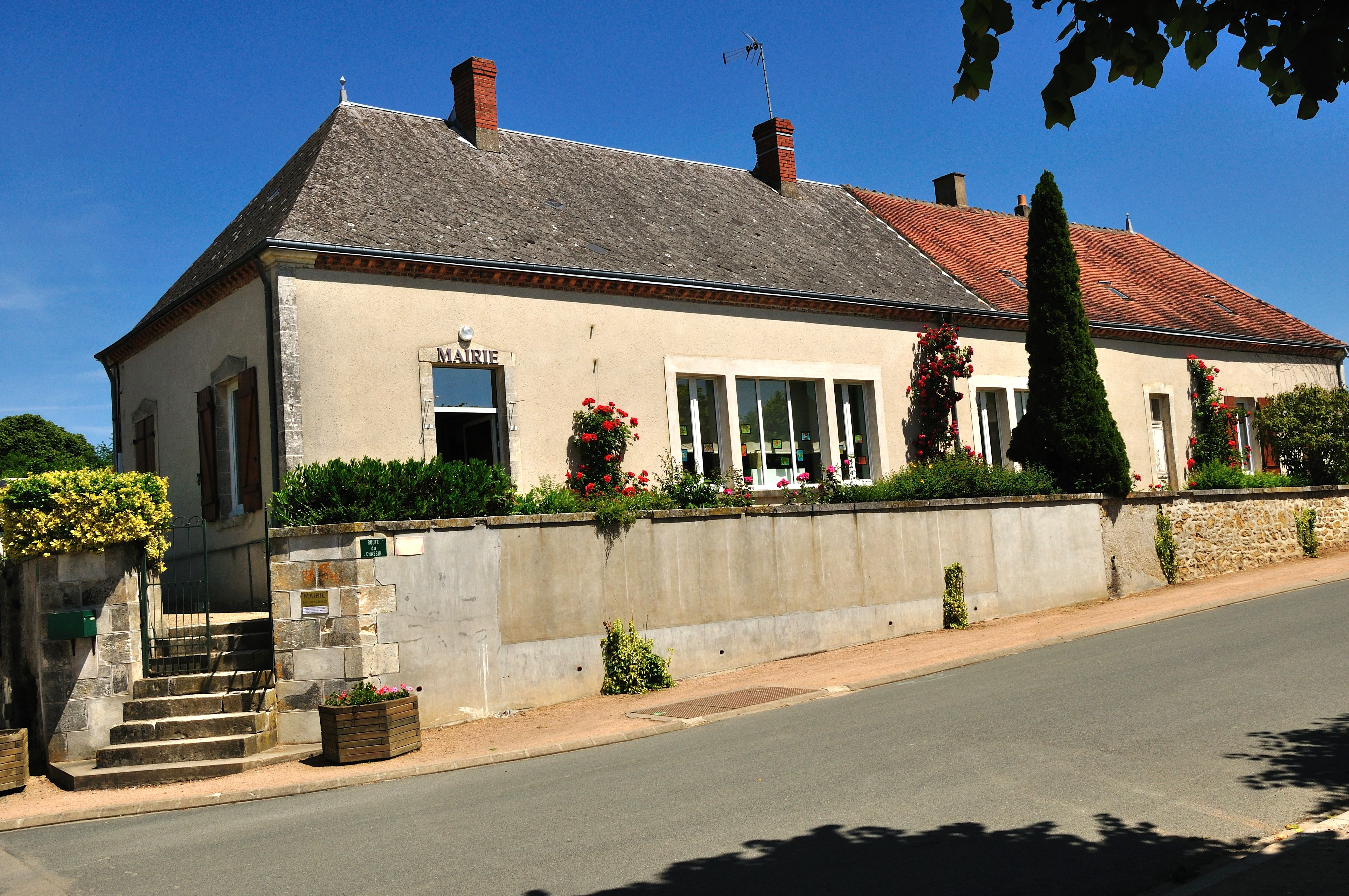 Mairie de Tranzault - Indre